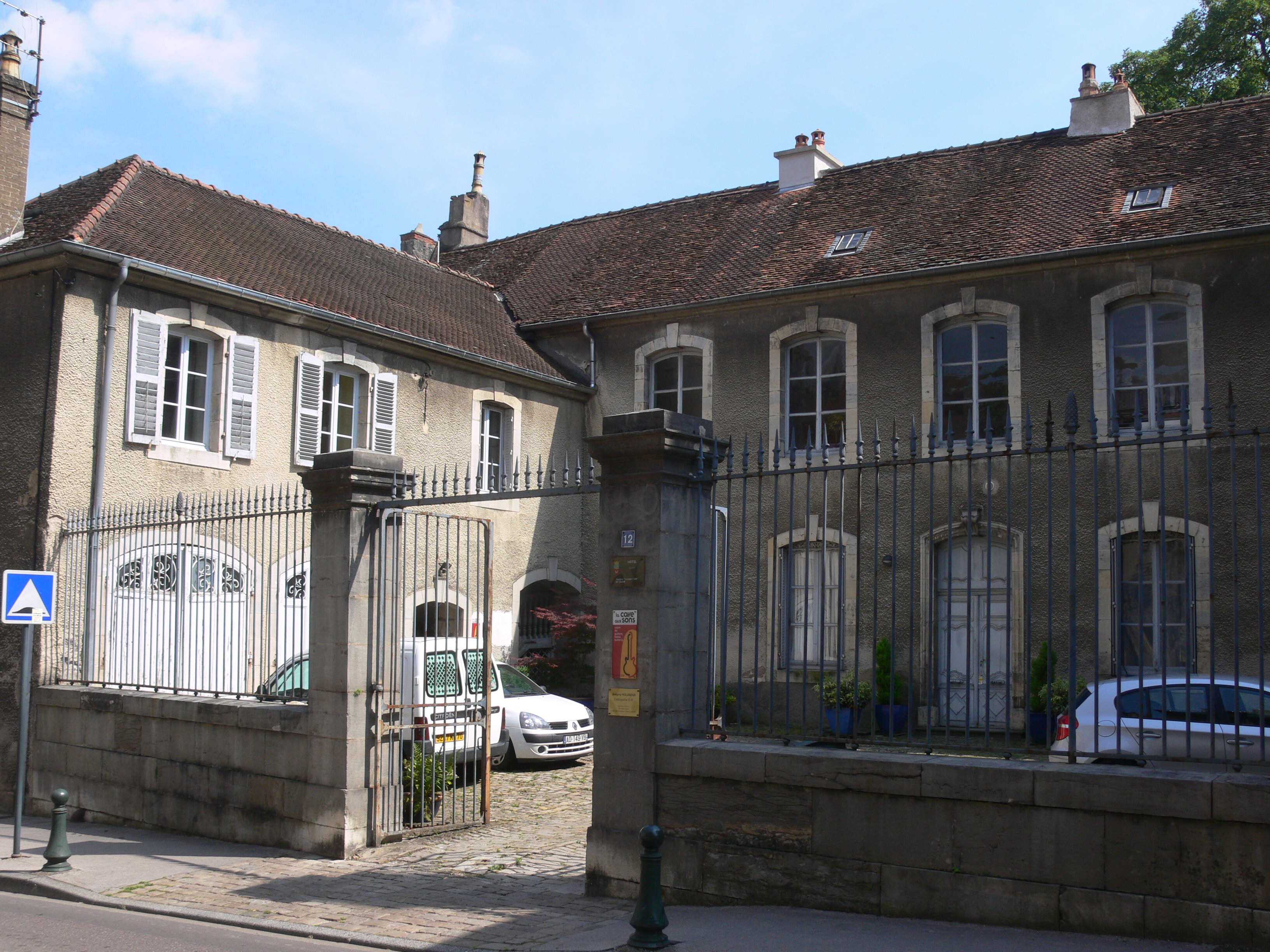 hôtel Lyautey de Genevreuille (Haute-Saône, France). Vers 1760